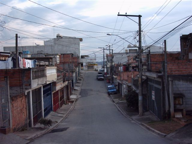 O Bairro Vila Natal no distrito do Grajaú, na cidade de São Paulo, Brasil